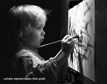 Loovustuba on esimene loovharidust pakkub huvikool Eestis